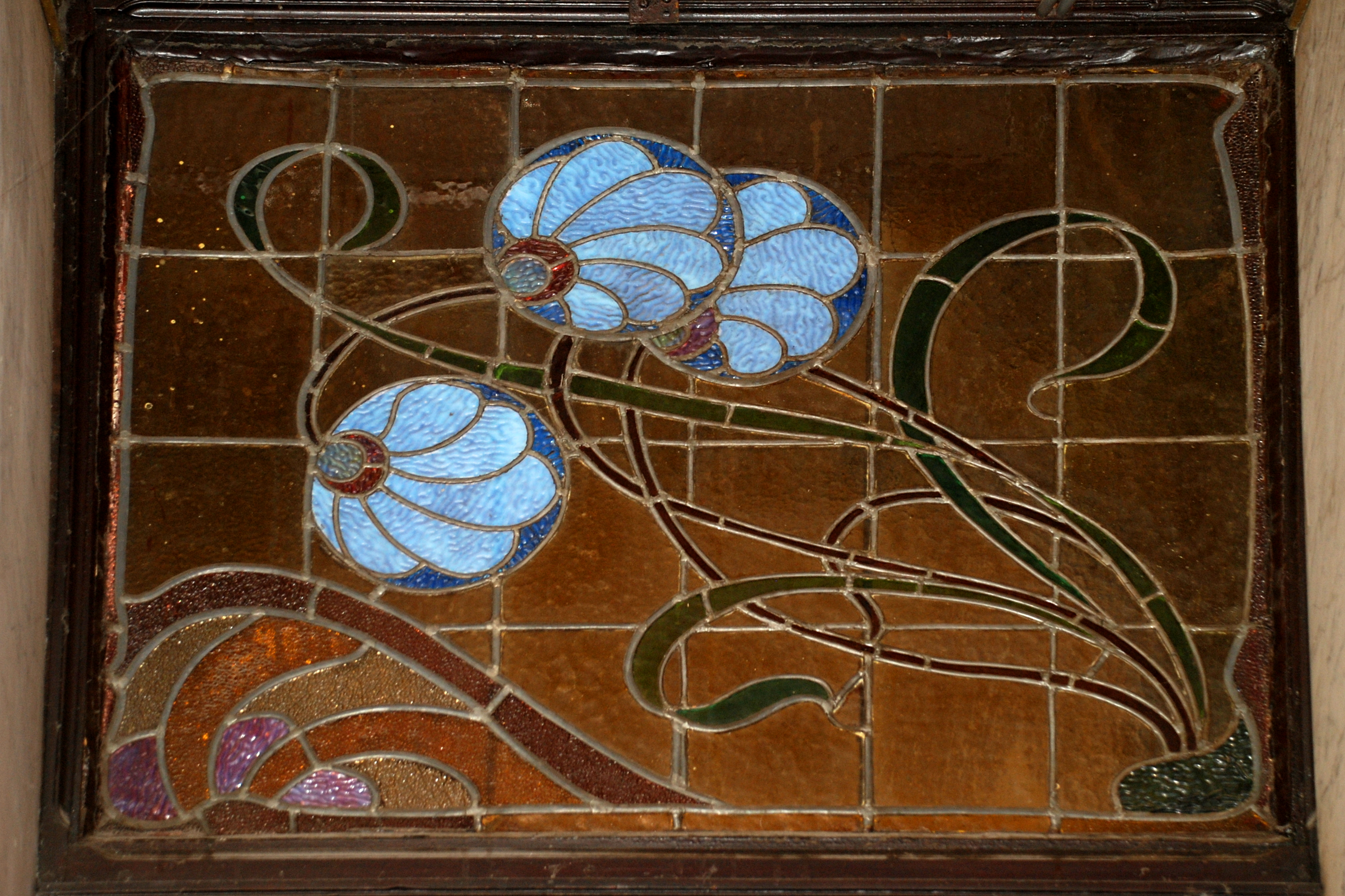 Belgique - Bruxelles - Taverne-restaurant le Falstaff